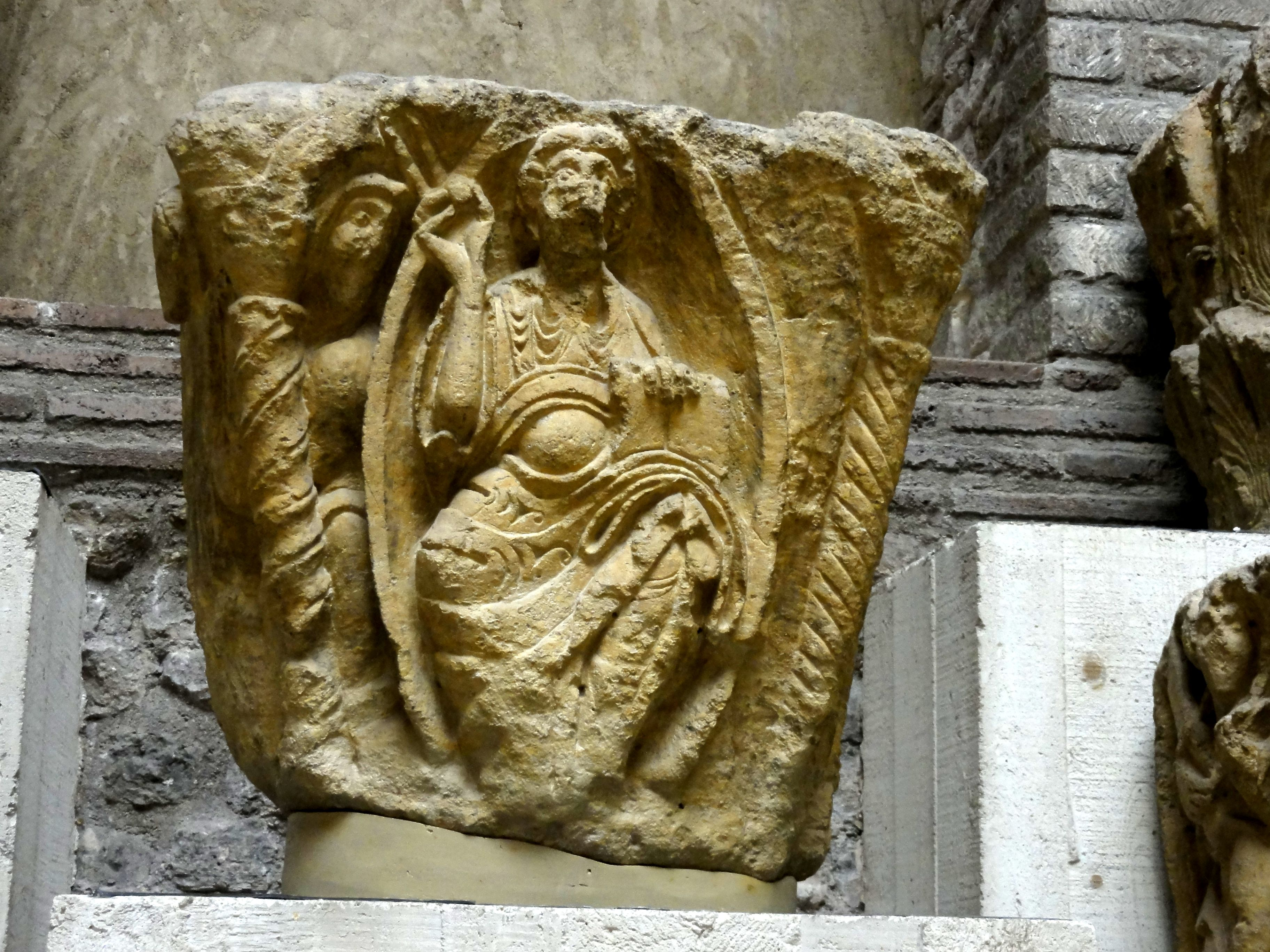 Abbaye Saint-Germain-des-Prés, chapiteau roman envoyé au musée de Cluny, inv. 18612. Se trouvait à l'est de la quatrième grande arcade du sud (n ° 31).